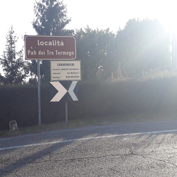 Cartello Passo dei Tre Termini (BS)